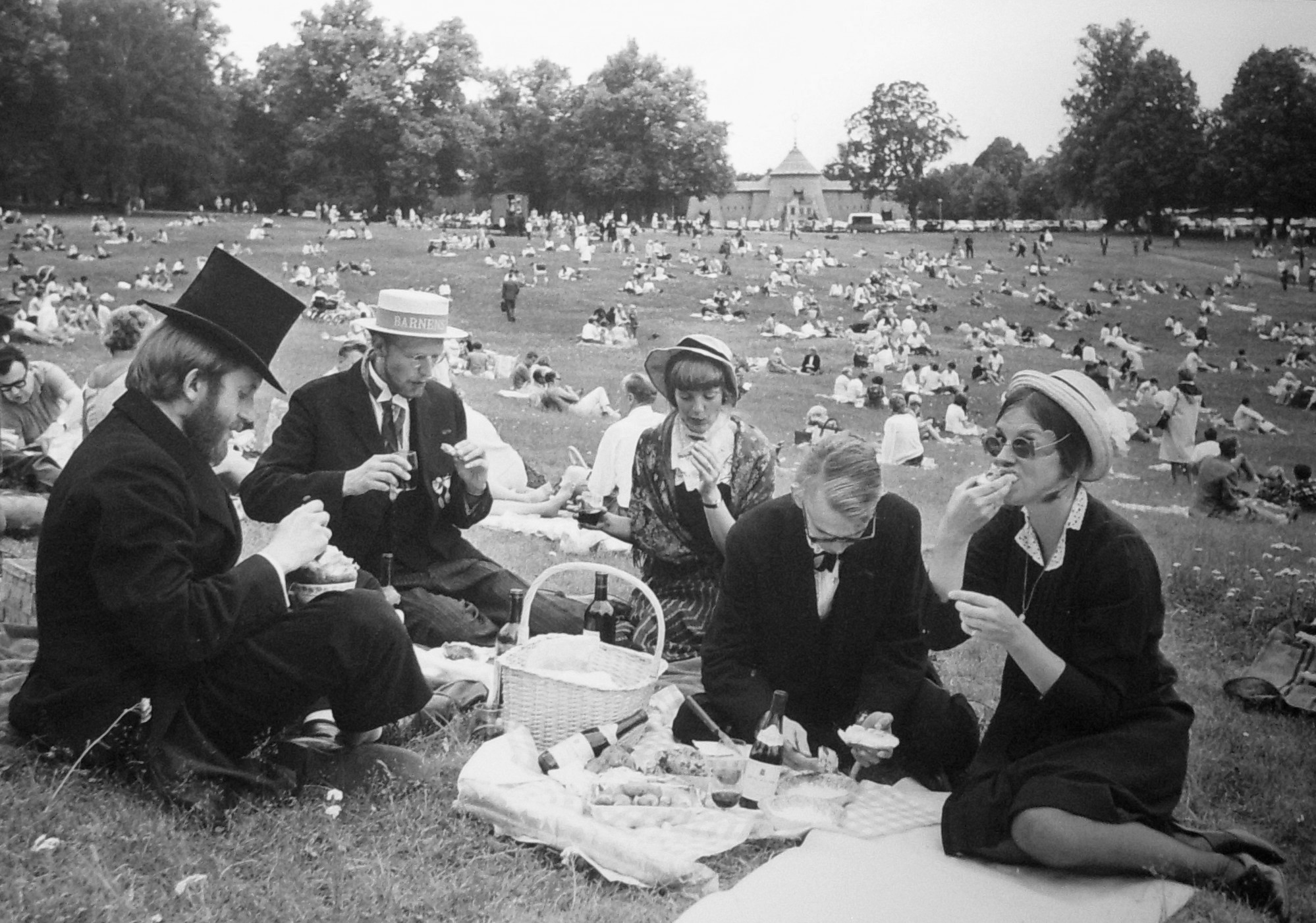 Bellmandagen i Hagaparken